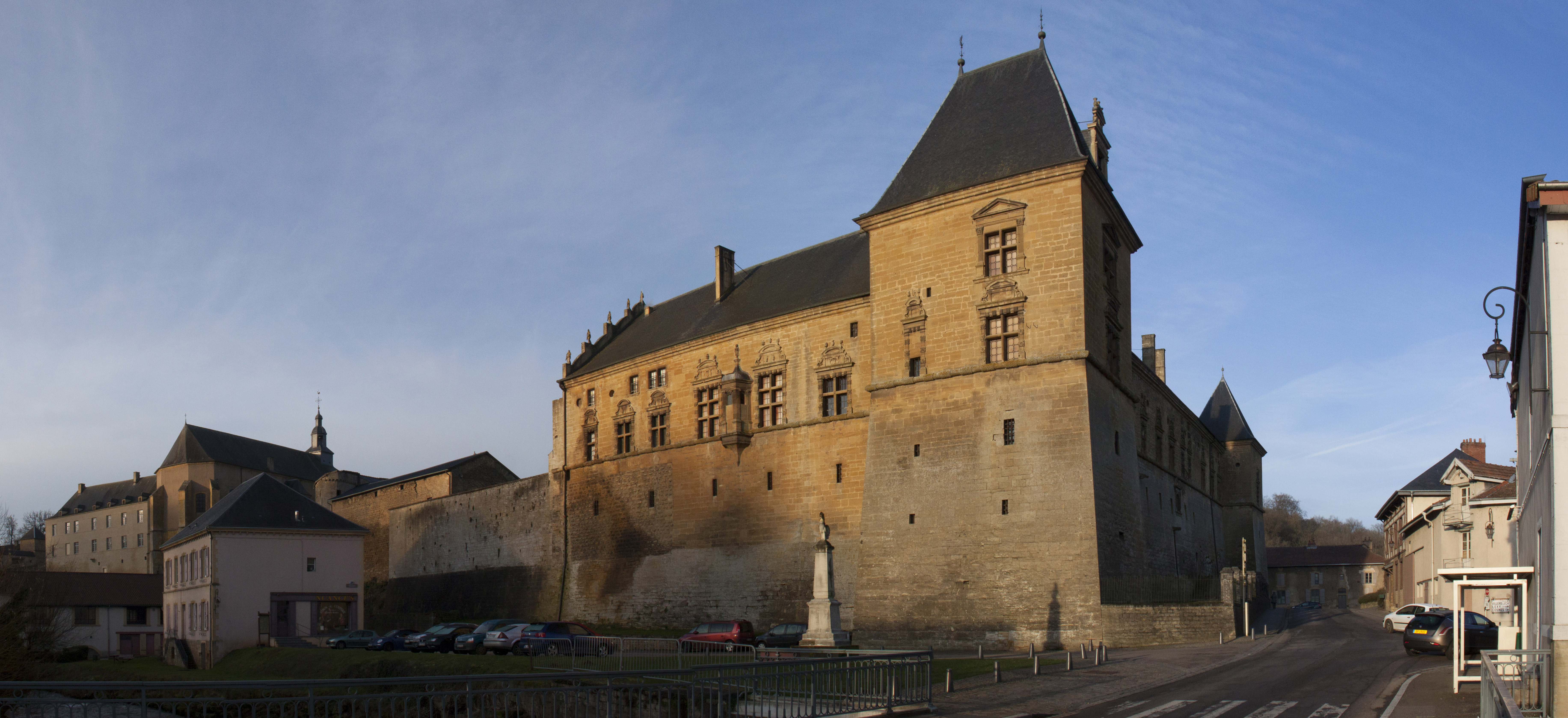 Château de Cons-la-Grandvillecommuns, oratoire, terrasse, fossé, tour, galerie, salon, cheminée, cuisine, sous sol, salle à manger, élévation, toiture, décor intérieur, mur de soutènement